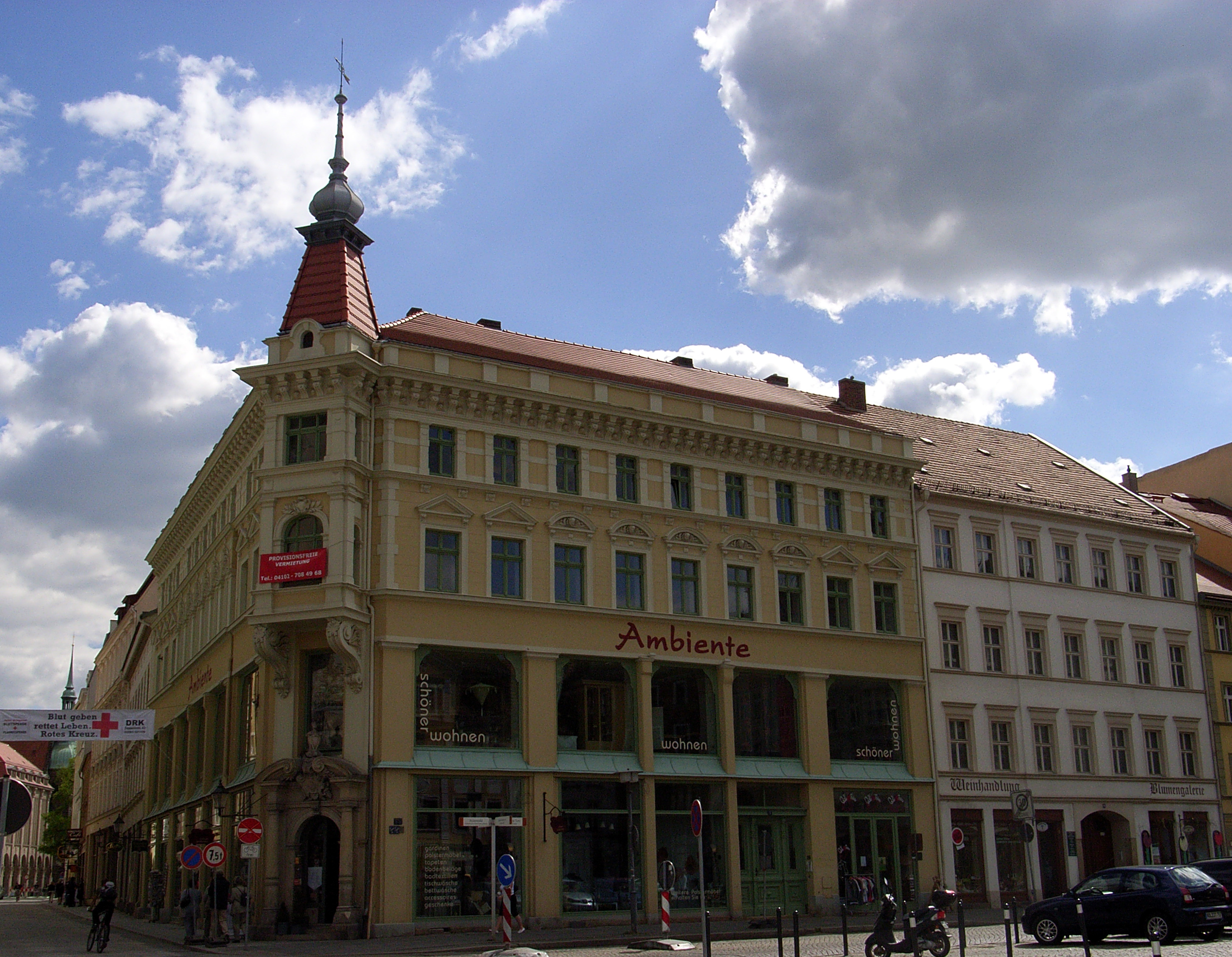 Gebäude in der Stadt Görlitz (Sachsen) - Obermarkt 7